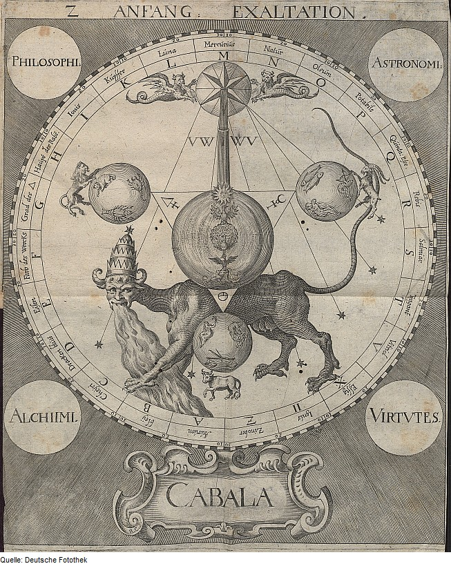 Original image description from the Deutsche FotothekTheosophie & Alchemie & Judentum & Kabbala